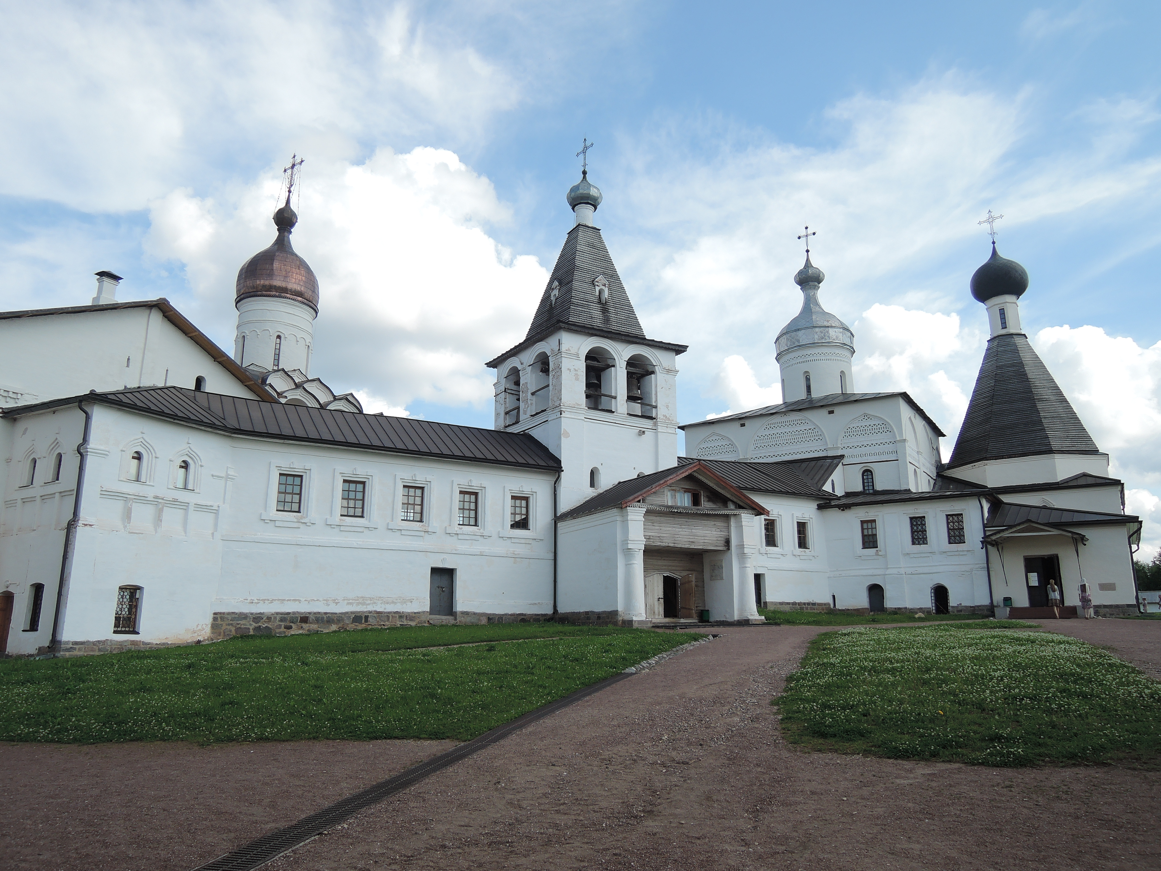 Klášter svatého Feraponta Bělozerského